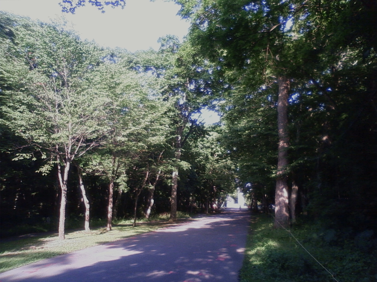 青葉公園入り口付近